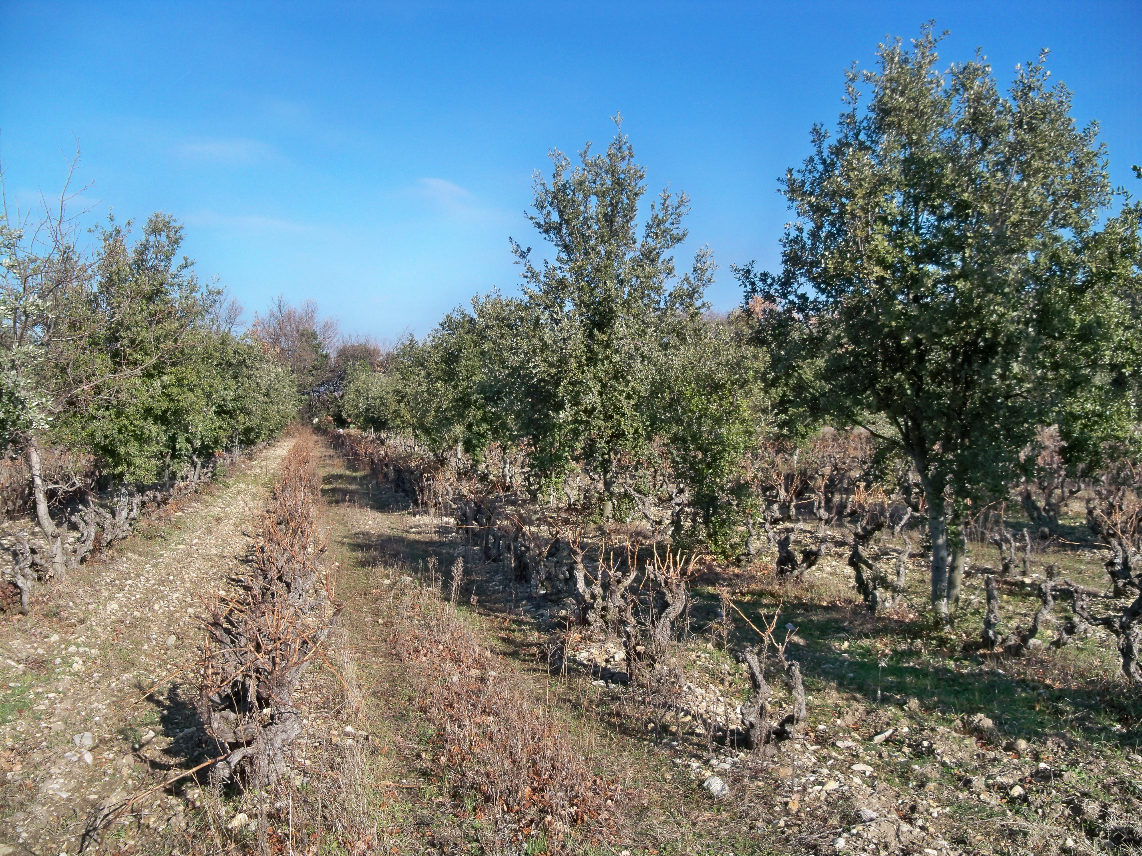 truffière et vignes à Richerenches, Vaucluse, France